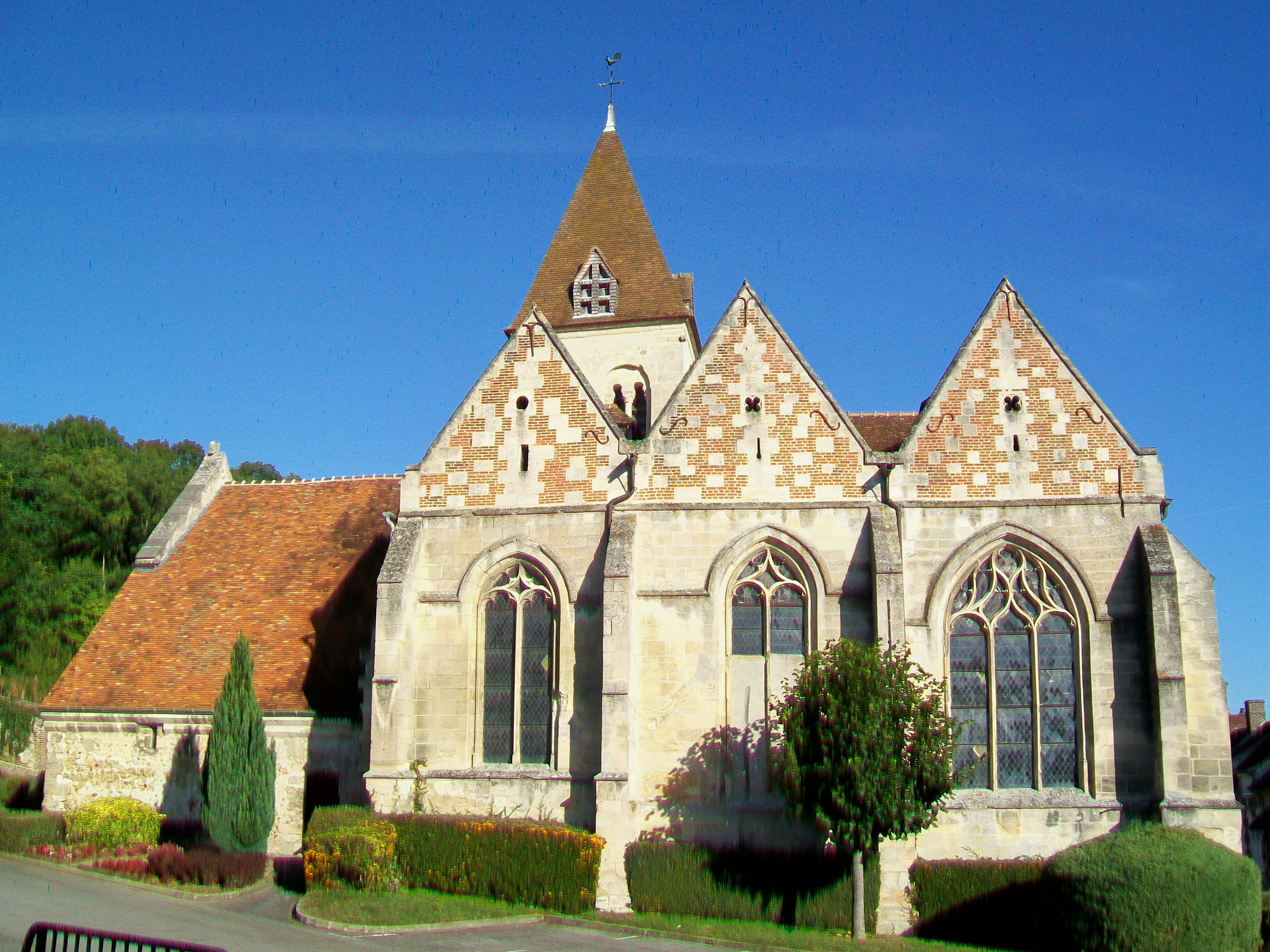 La façade sud-est, vers l'école.